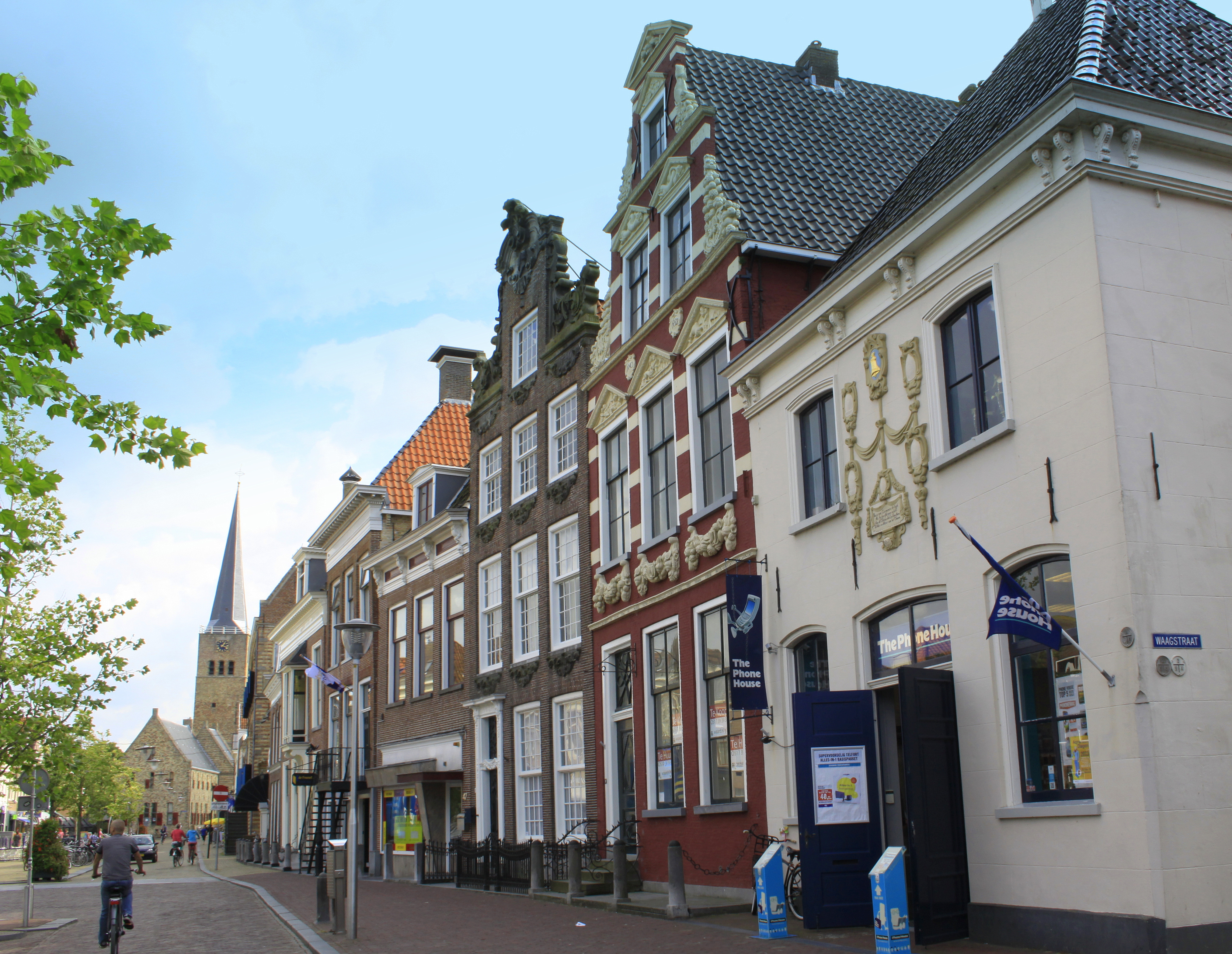 De Voorstraat in Franeker met allemaal statige woningen, stuk voor stuk monumenten